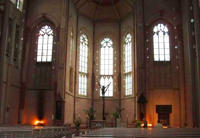 Kath. Pfarrkirche St. Antonius Kevelaer